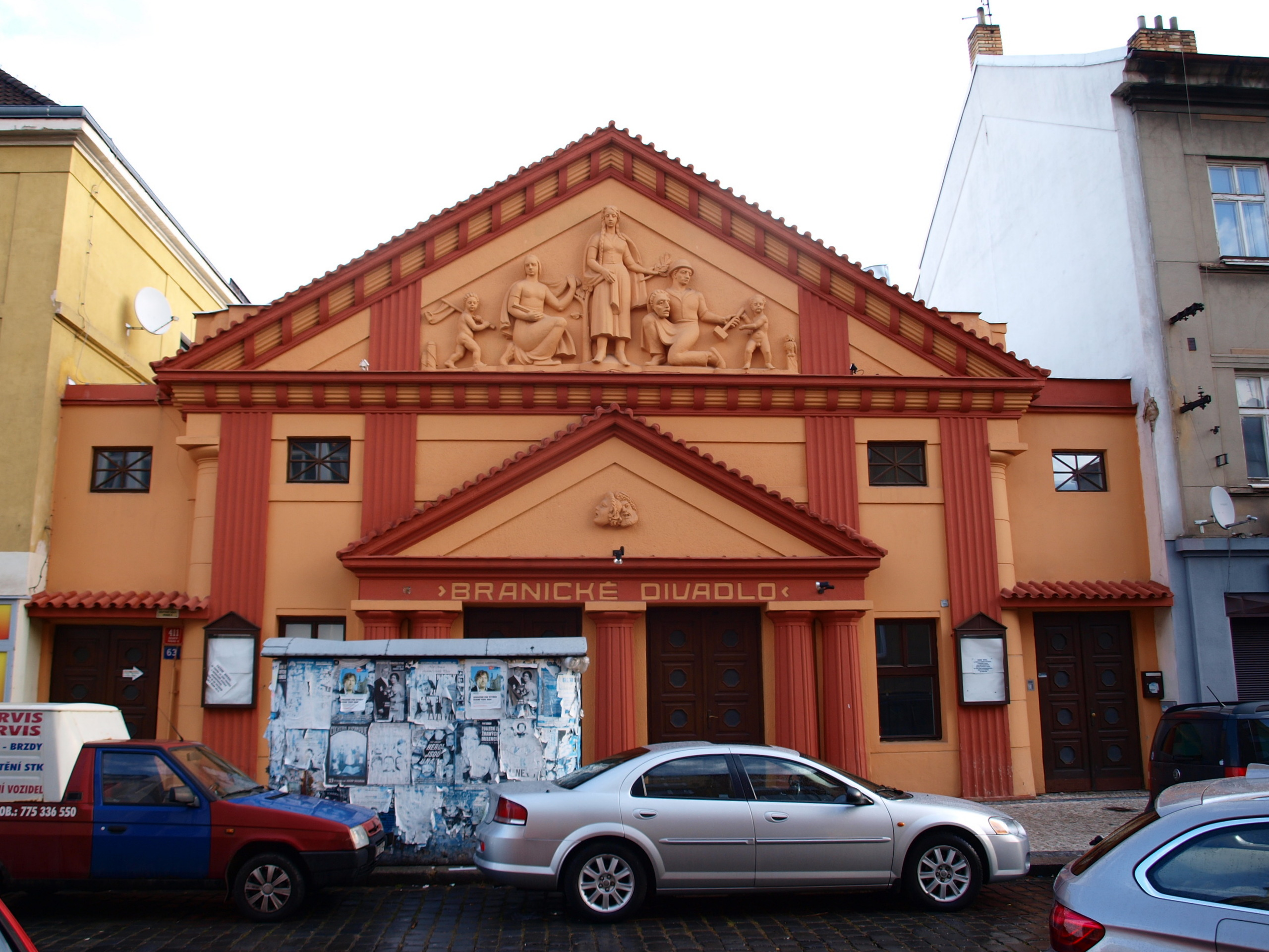 Branické divadlo